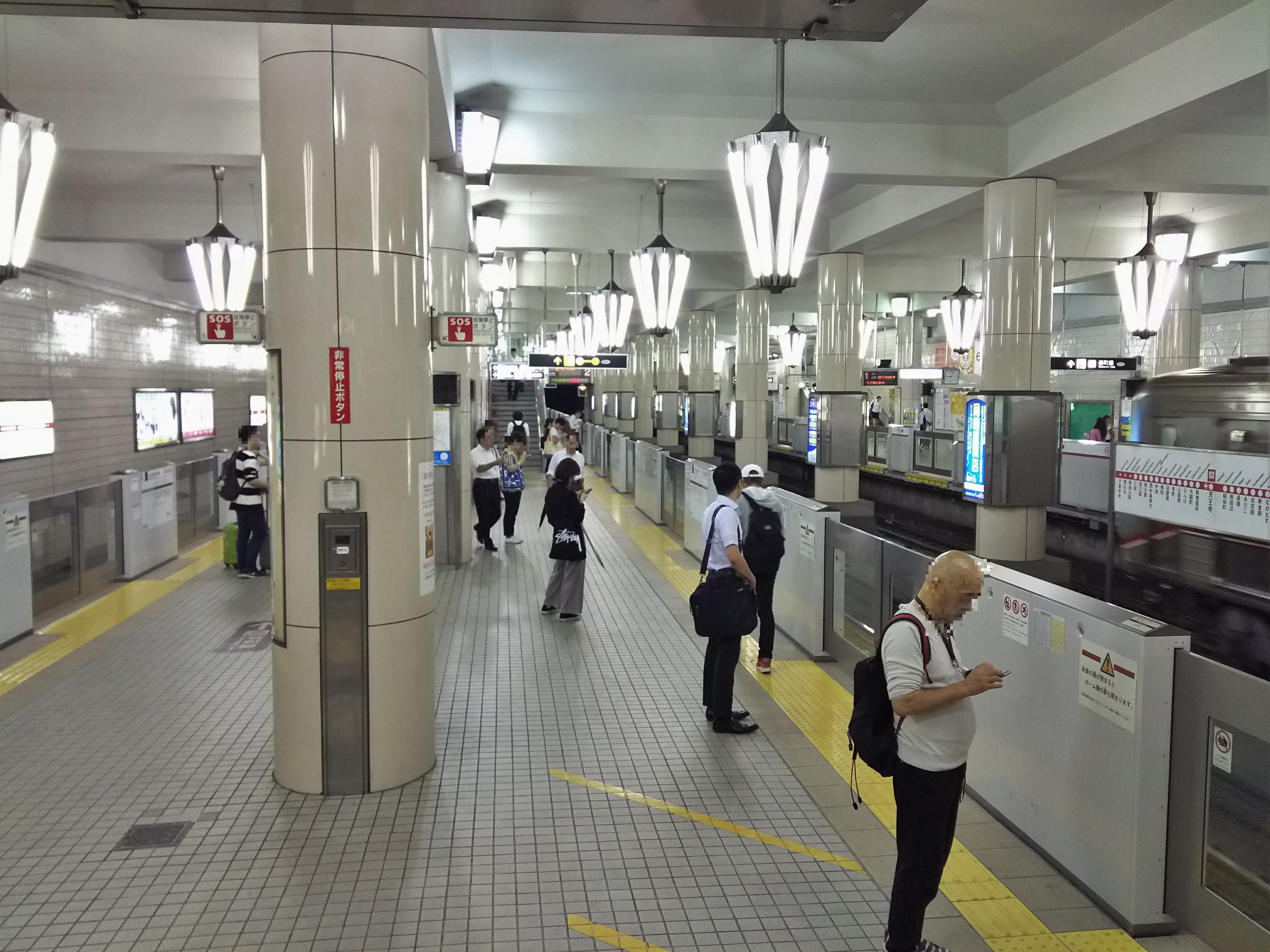 大阪市営地下鉄御堂筋線天王寺駅プラットホーム（大阪市天王寺区）ホームドア設置後